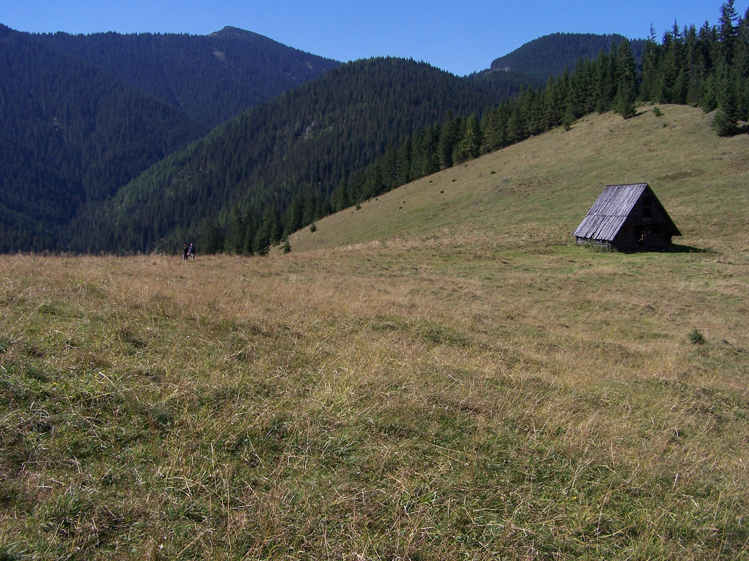 Polana Jamy (Tatra Mountains). U góry od lewej: Bobrowiec, dolina Głębowiec, Jaworzyński Przysłop i Parzątczak